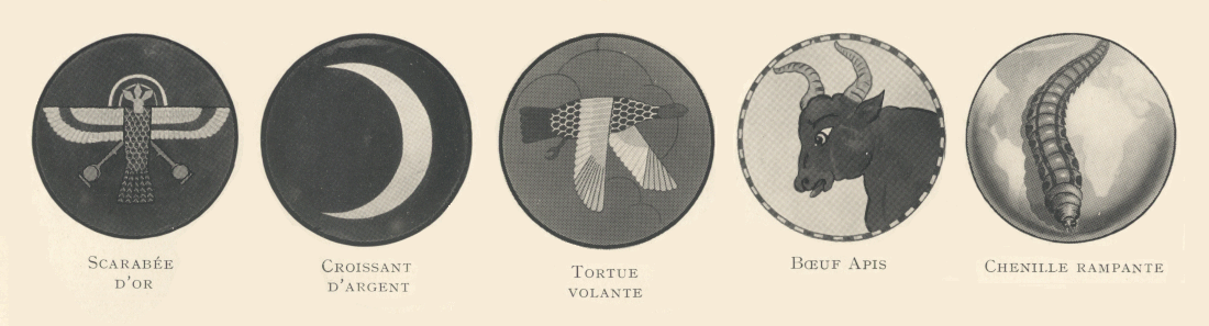 Sigles des autochenilles lors de la croisière noire